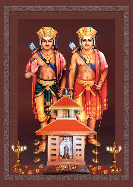 Koti Chennayya